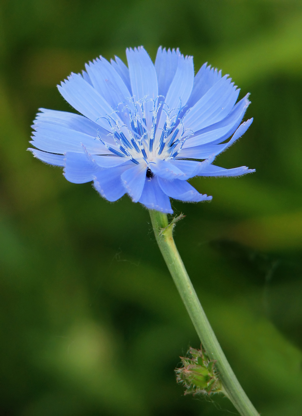 Description/Beschreibung: Gemeine Wegwarte (Cichorium intybus) am Wegesrand in Norddeutschland Author/Fotograf: Darkone, 30. Juni 2006